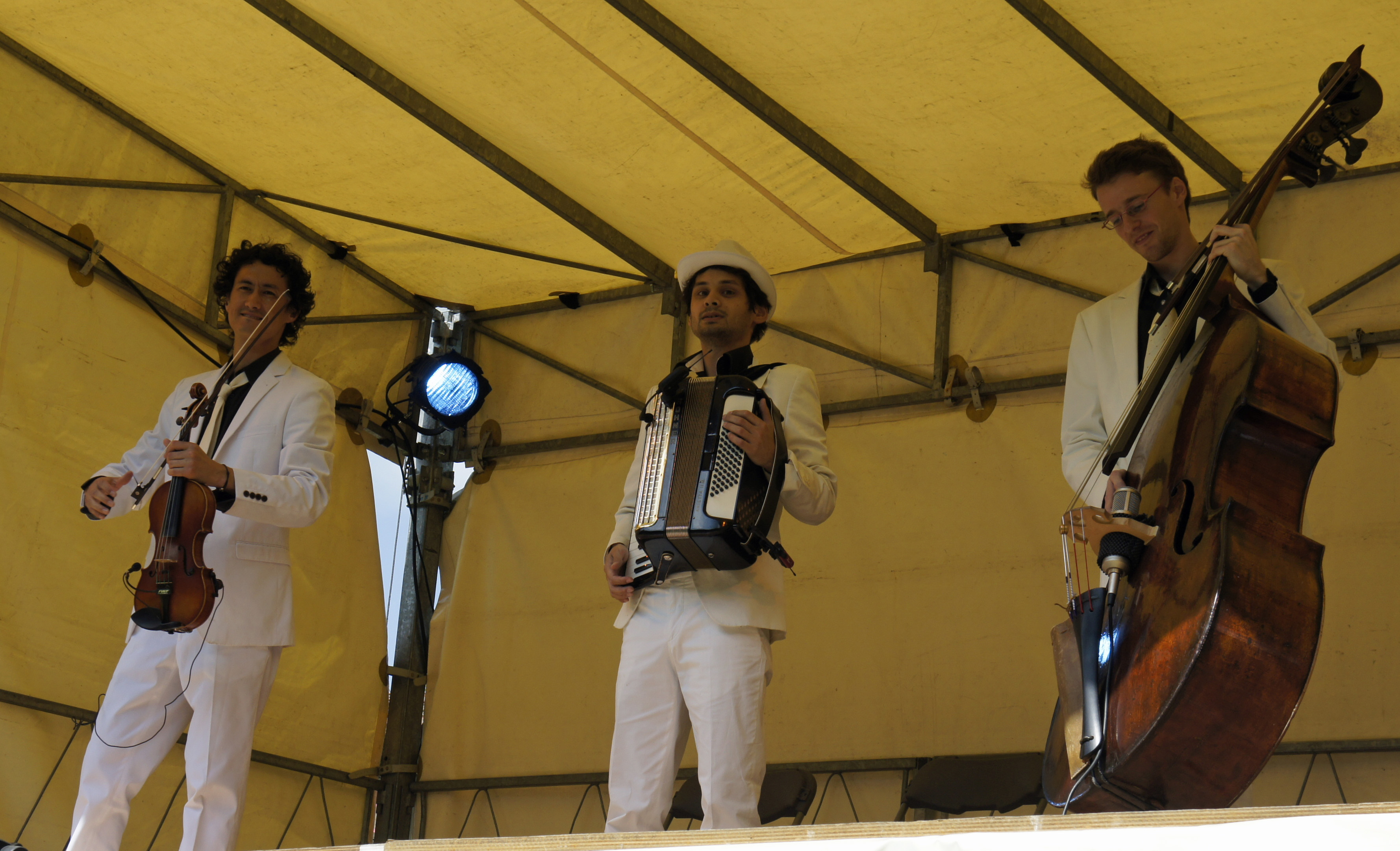 Les_Tromanos, Yorrick et Daniel Troman avec Yann Dubost, se produisant au Château des grenouilles vertes pendant les Flaneries musicales.